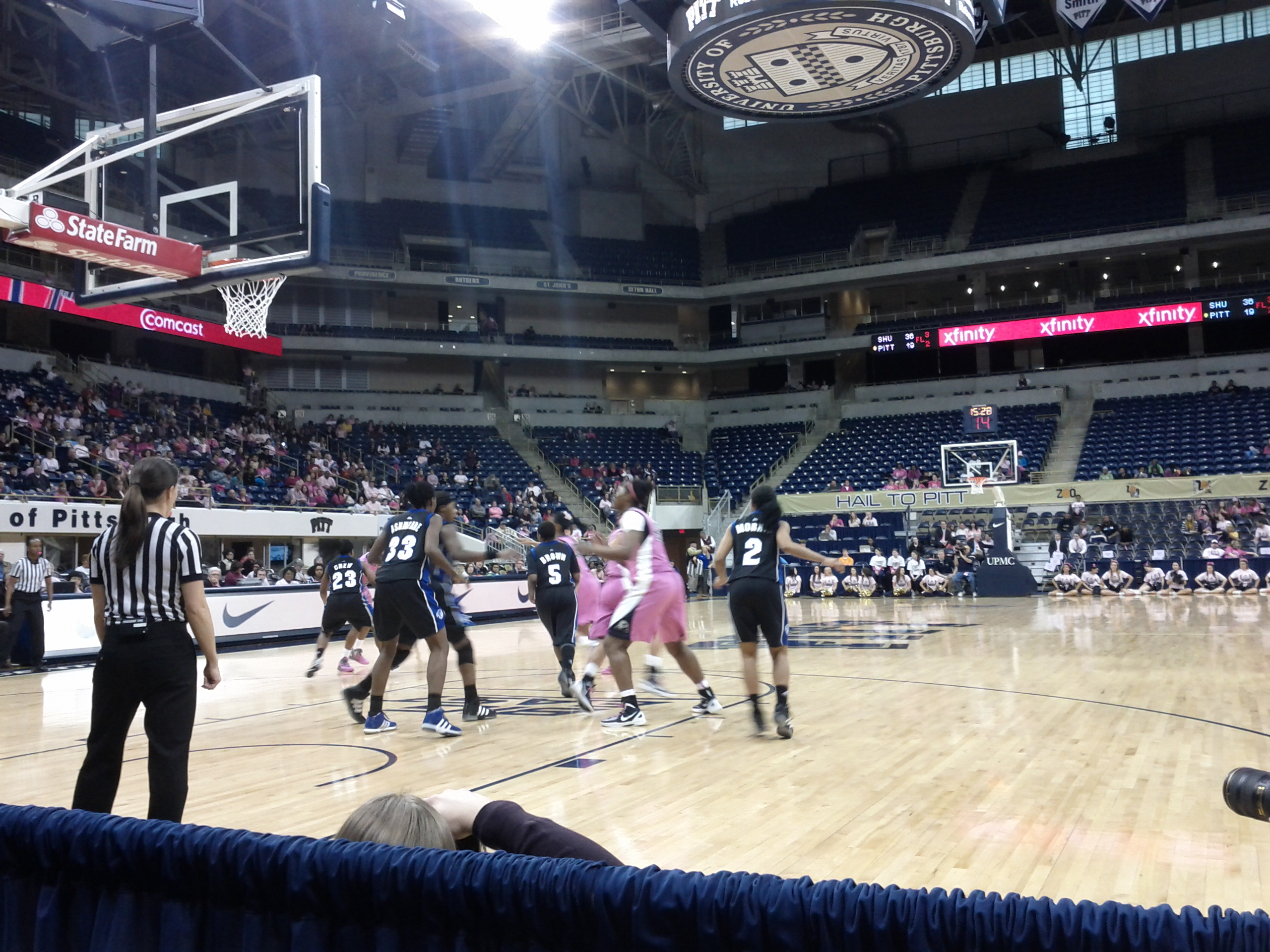 Pitt v Seton Hall